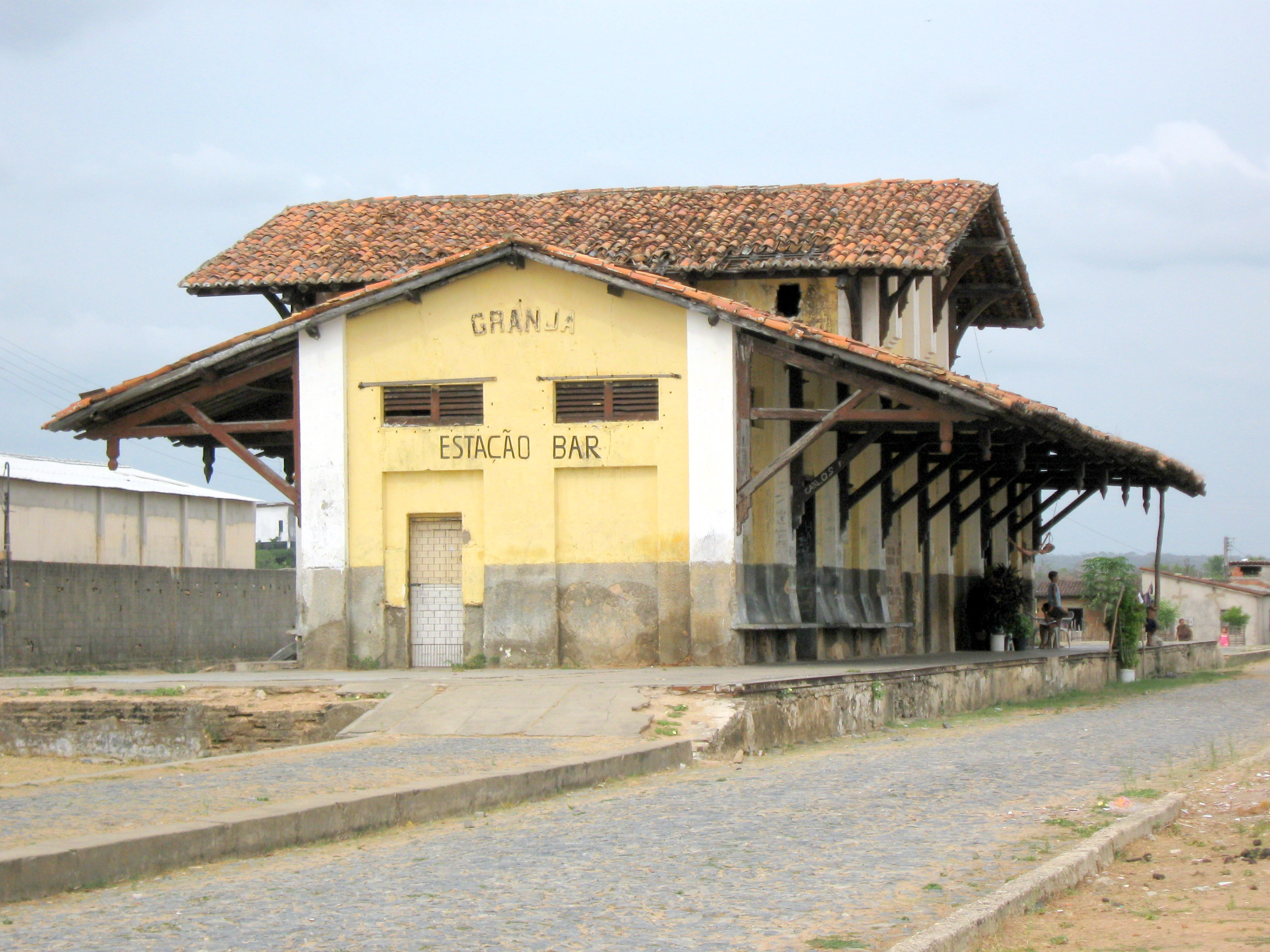 Estação ferroviária de Granja inaugurada em 1882 e desativada na década de 1970.